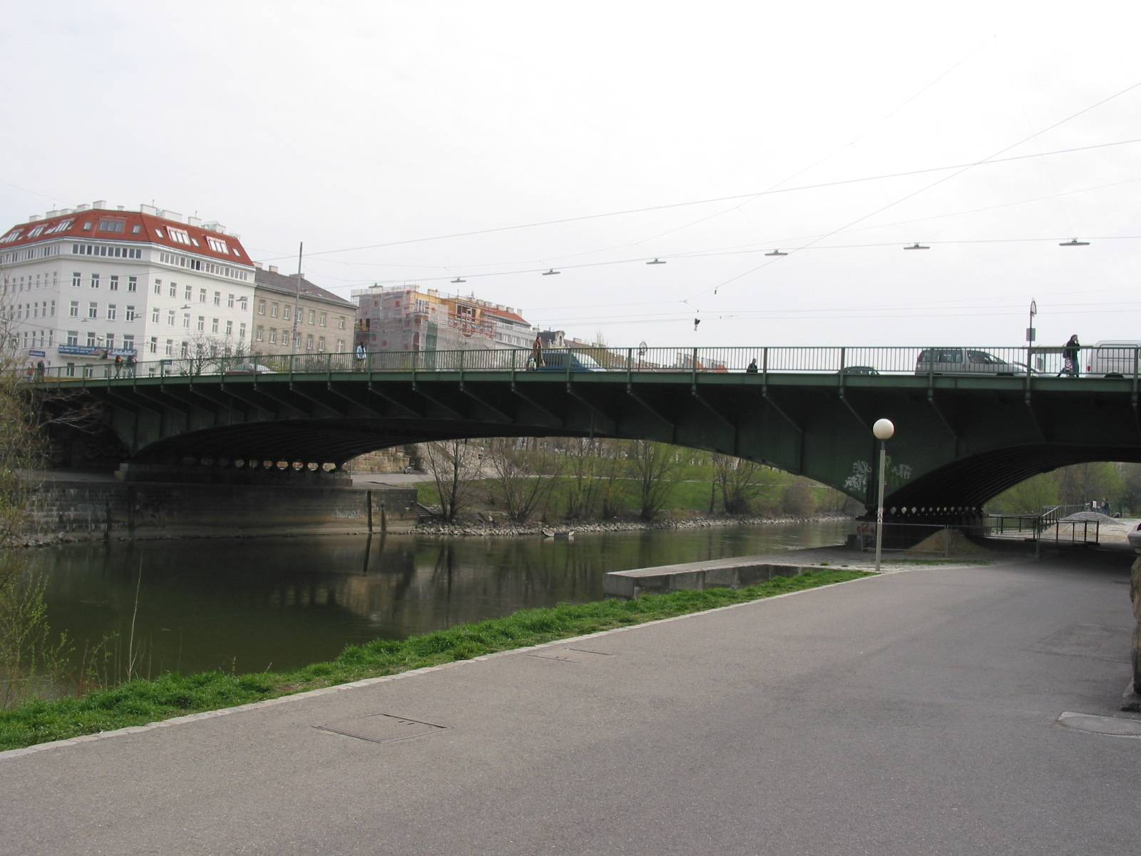 de: Friedensbrücke, Wien en: Friedensbrücke, Vienna